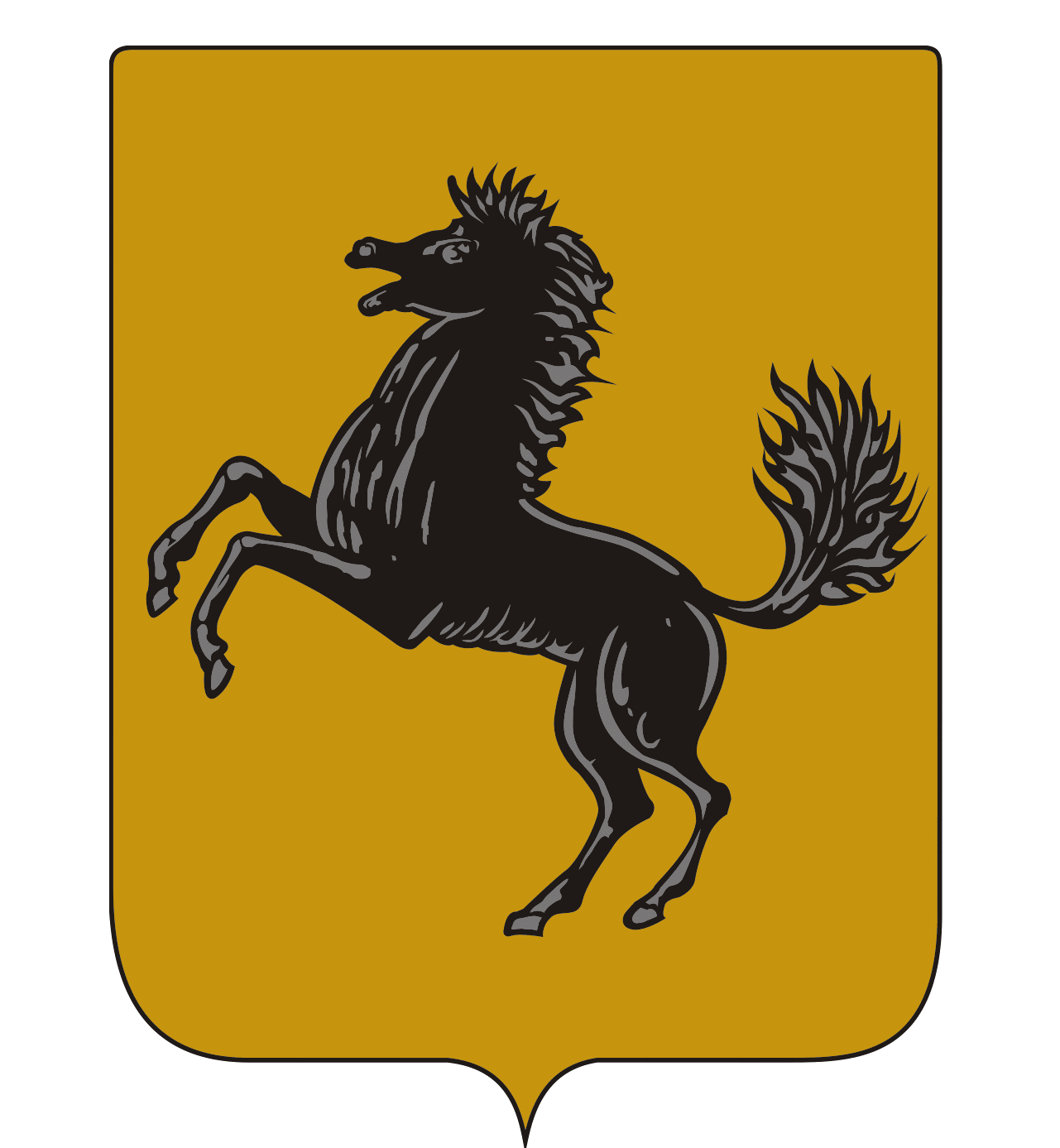 Stemma della città metropolitana di Napoli dal 1 gennaio 2015